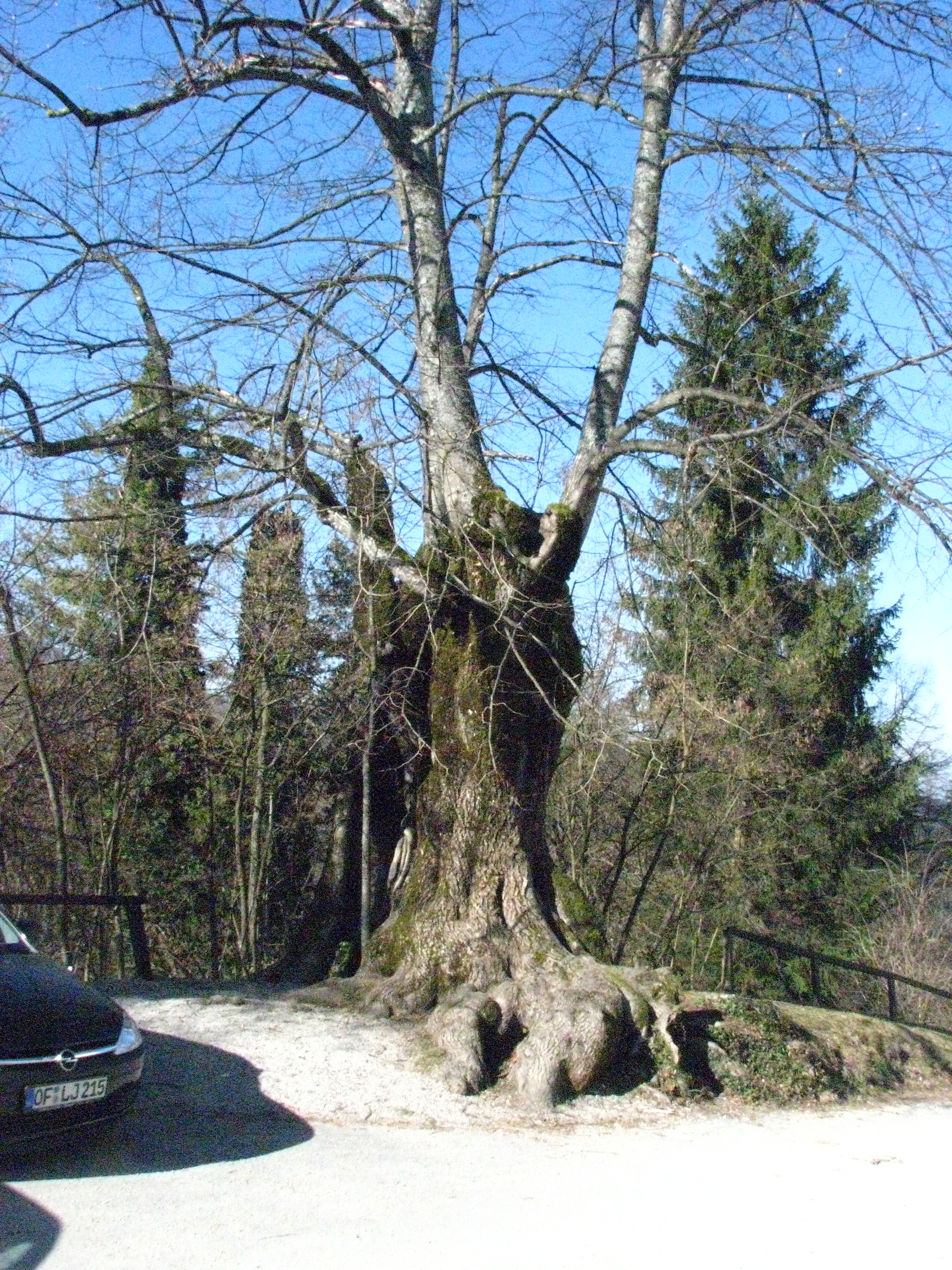 Turjaška lipa